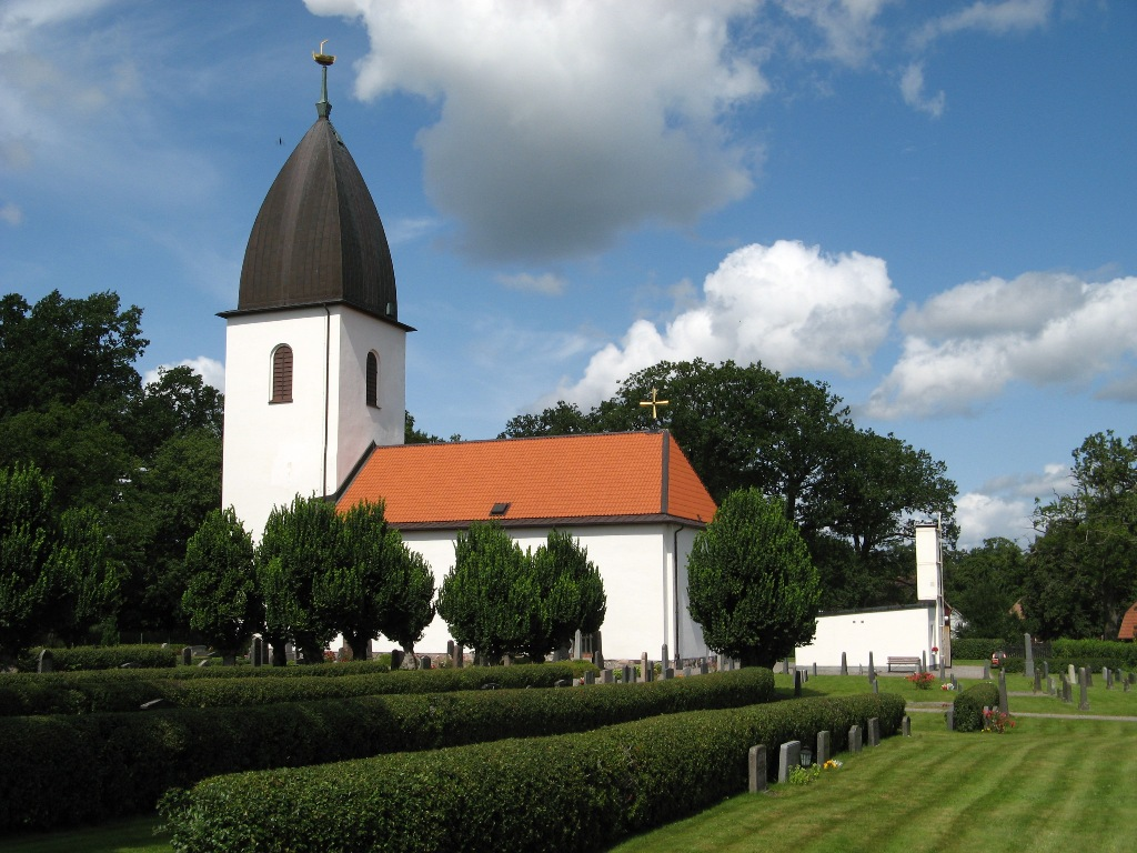 Östra Eds kyrka